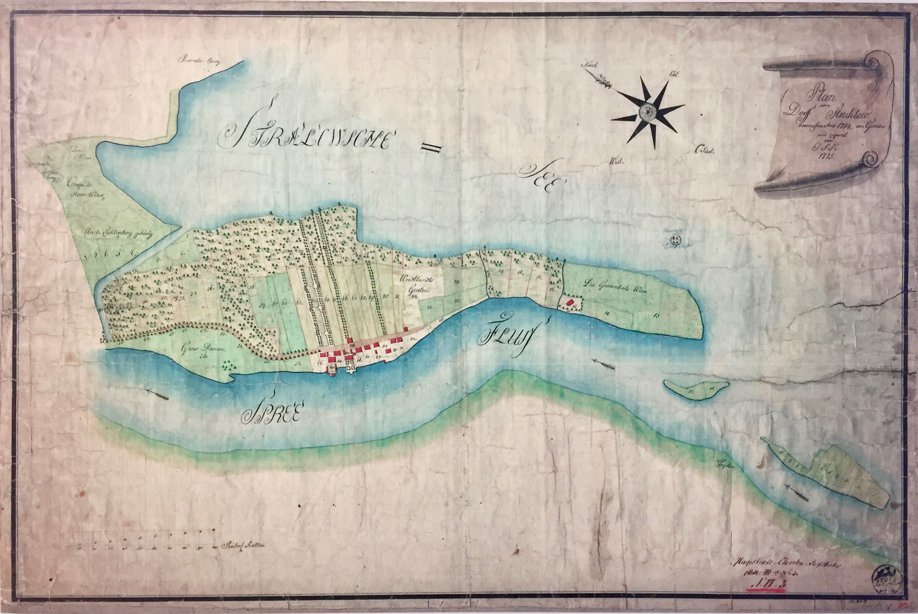 Plan vom Dorff Stralow 1775, Das Dorff Stralow, Stralowsche See, Spree Fluss